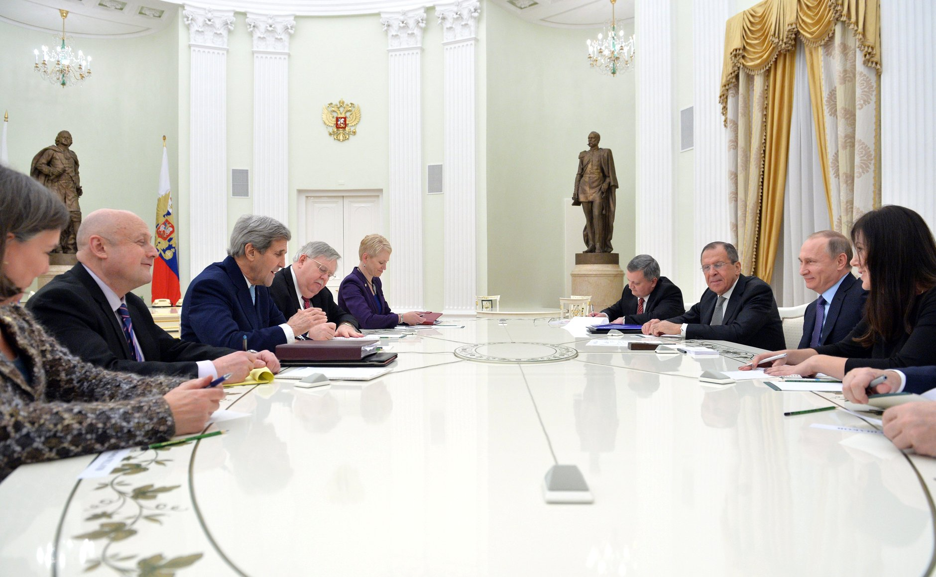 Президент России Владимир Путин на встрече с госсекретарём США Джоном Керри